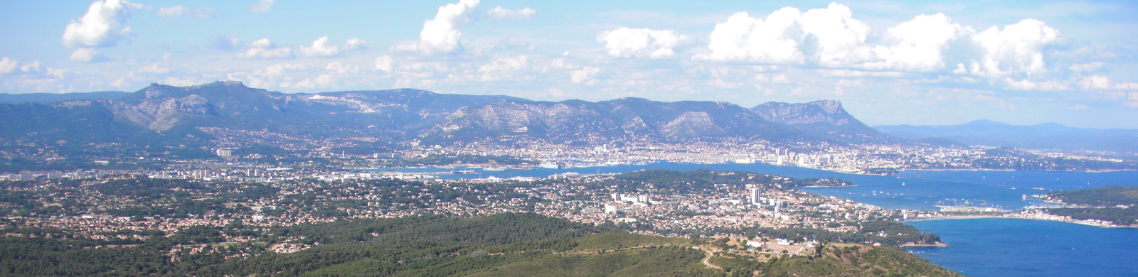 Les monts toulonnais vu depuis le Massif du Cap Sicié.